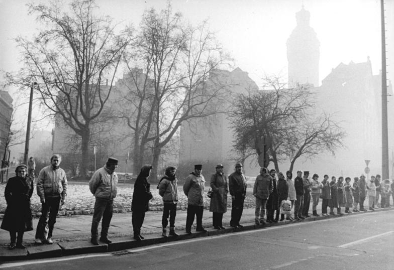 Leipzig, Lutherring, Menschenkette ADN-ZB Gahlbeck 3.12.89 Leipzig: Menschenkette- Die Fernverkehrsstraße 2 führt an Leipzig am Lutherring in der Nähe des Neuen Rathauses entlang. Auch hier hatten sich Menschen versammelt, um für die demokratische Erneuerung des Landes zu demonstrieren.